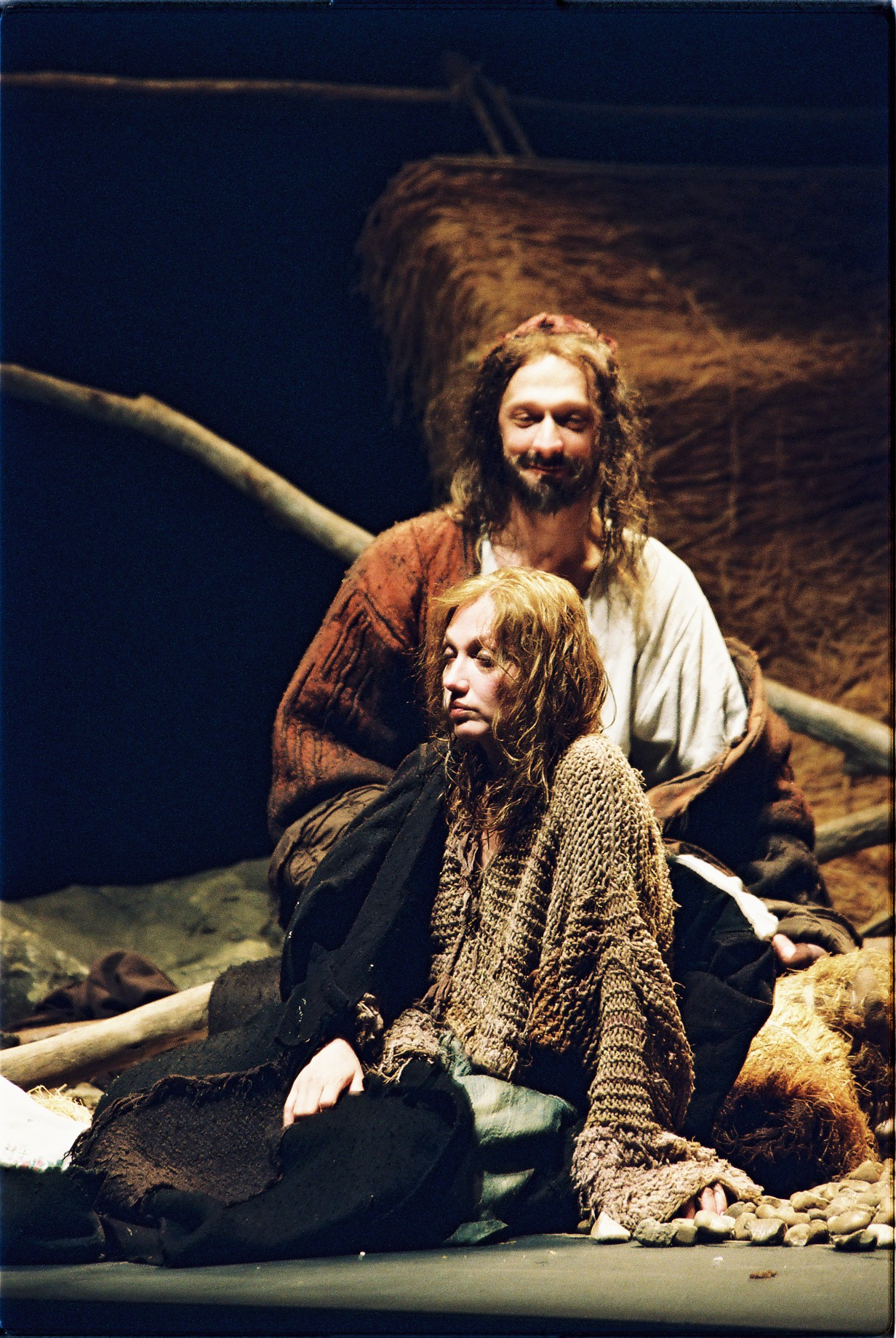 ישראל סשה דמידוב ויבגניה דודינה - העבד - 2002